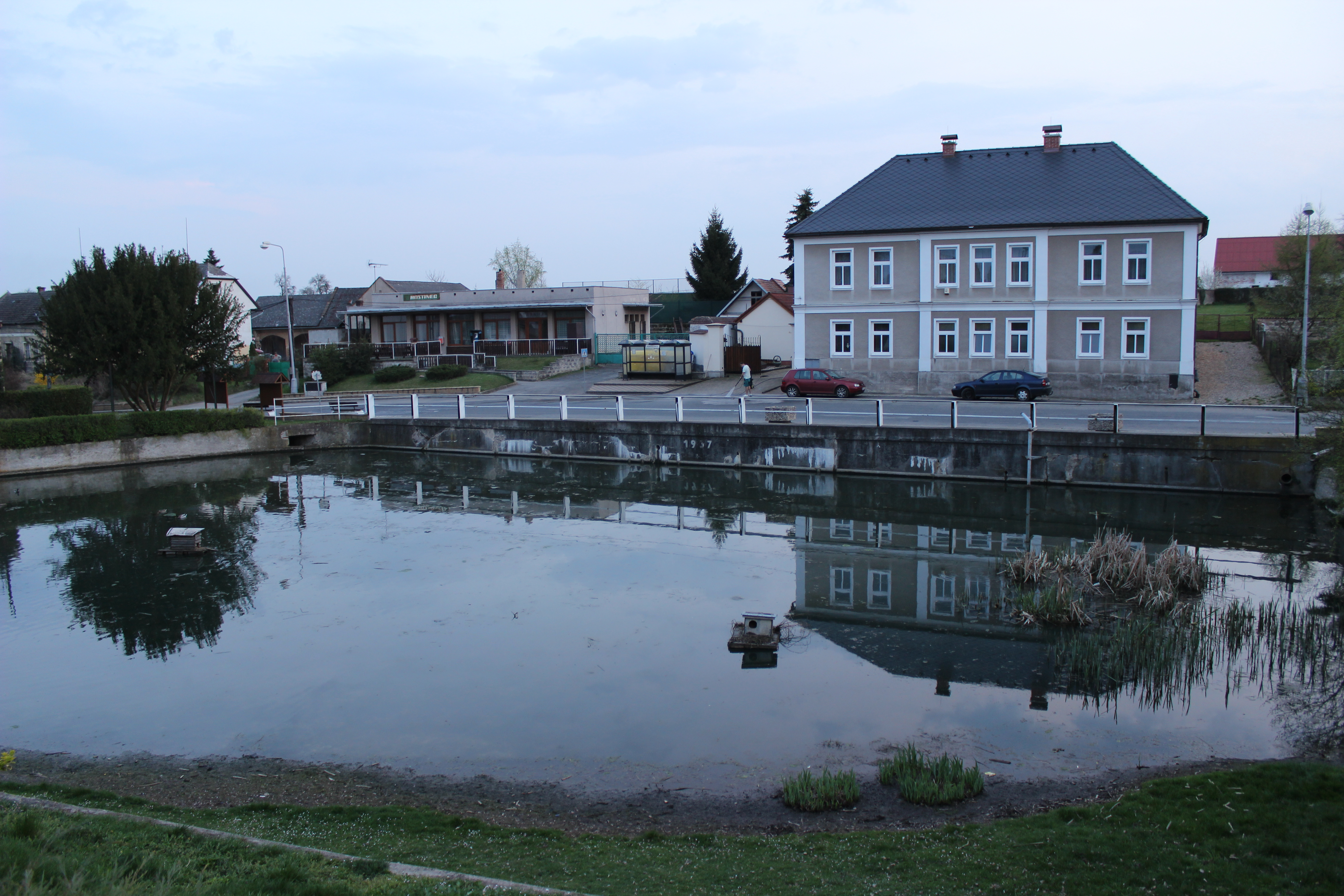 Nádrž na návsi v Nemyslovicích, v pozadí dům číslo popisné 19. This photograph was taken with a Canon EOS 600D.